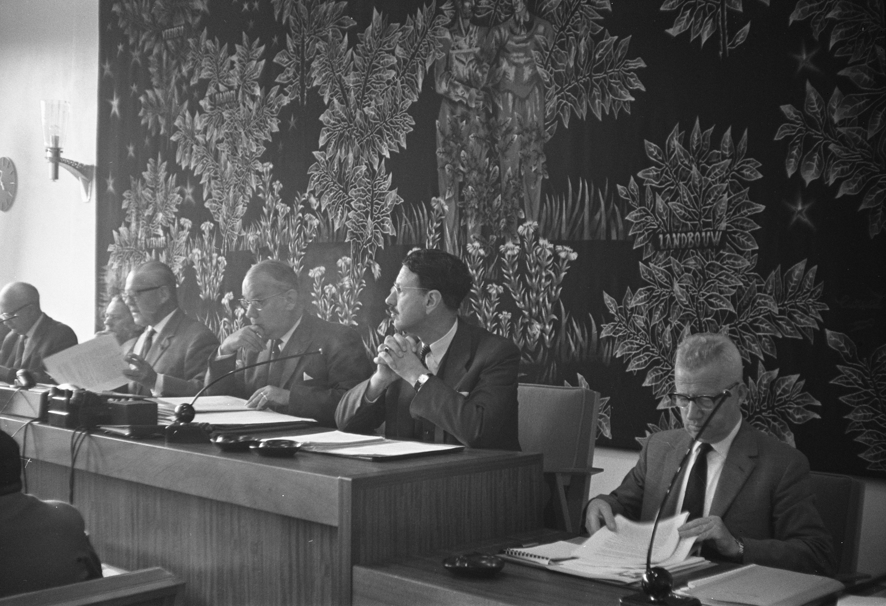 Collectie / Archief : Fotocollectie Anefo Reportage / Serie : [ onbekend ] Beschrijving : Bijeenkomst van de SER over de representativiteit der hoge ambtenaren Datum : 25 september 1959 Trefwoorden : AMBTENAREN, bijeenkomsten, representativiteit Instellingsnaam : SER Fotograaf : Pot, Harry / Anefo Auteursrechthebbende : Nationaal Archief Materiaalsoort : Negatief (zwart/wit) Nummer archiefinventaris : bekijk toegang 2.24.01.05 Bestanddeelnummer : 910-7008